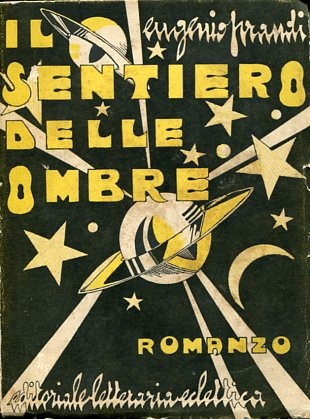 Copertina del romanzo Il sentiero delle ombre di Eugenio Prandi, Edizioni Letteraria Eclettica, Roma, 1933. Autore dell'illustrazione ignoto.